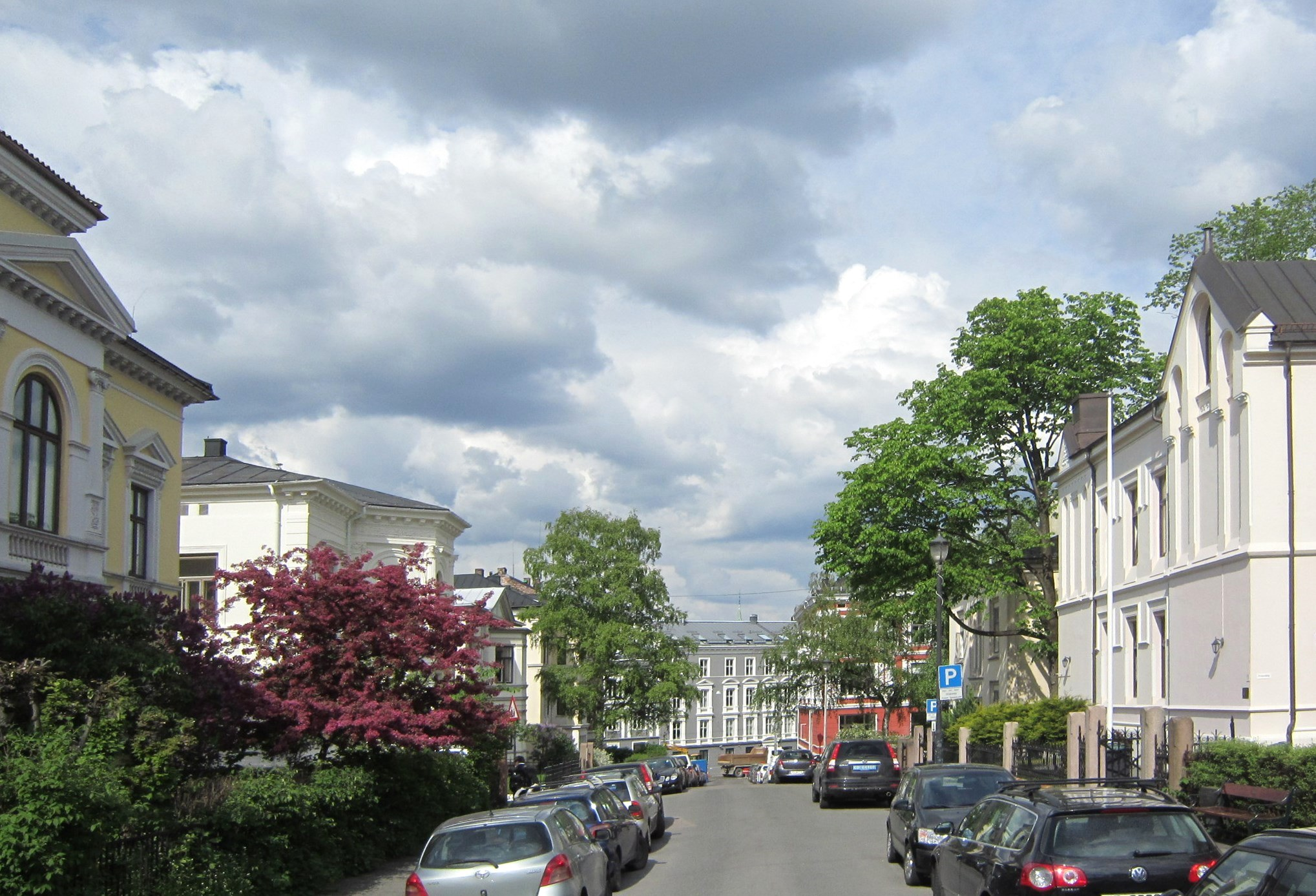 Uranienborg terrasse i Oslo i retning Professor Dahls gate